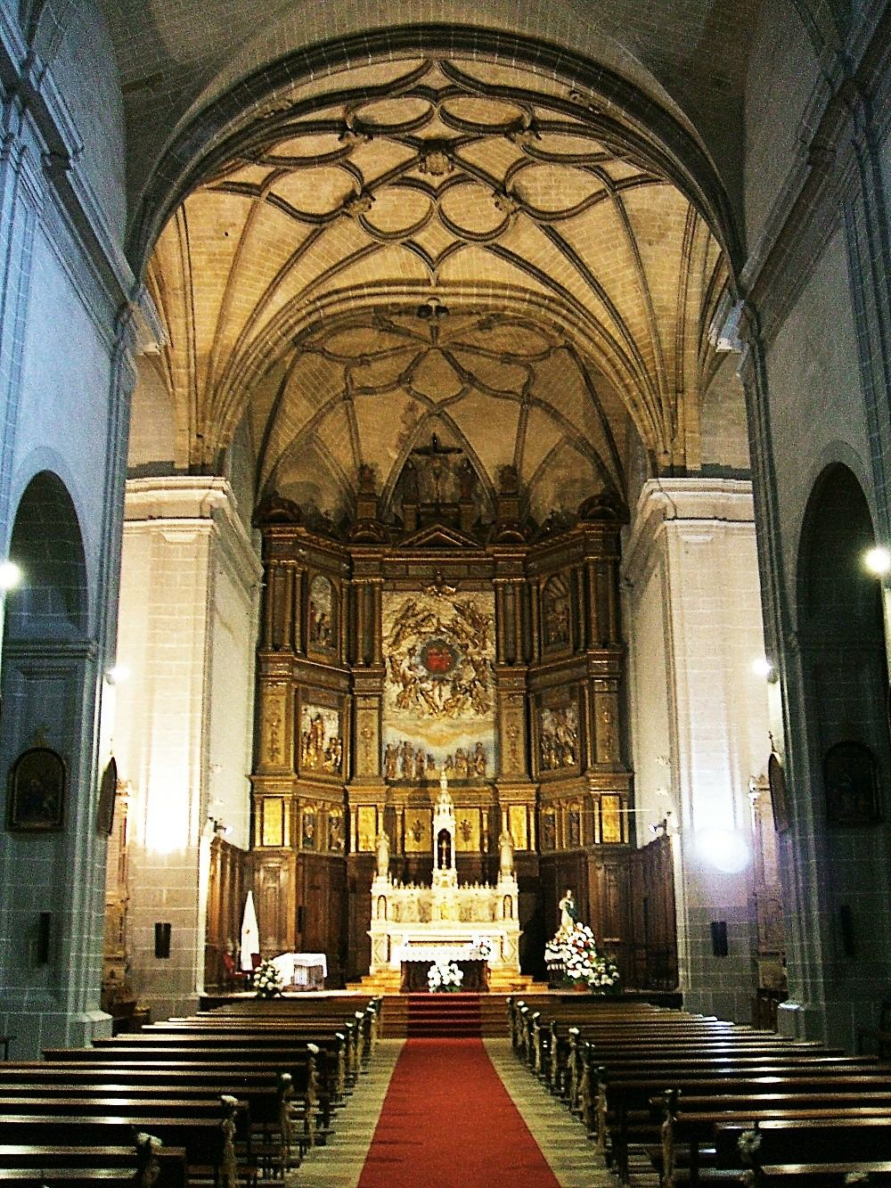 Cabecera de la Iglesia del Convento/Colegio de los Sagrados Corazones, Miranda de Ebro (Burgos, España/Spain)